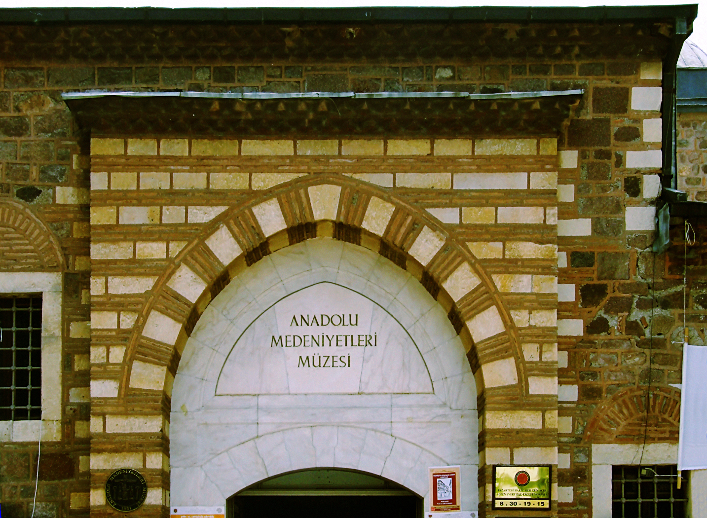 Muzeum Cywilizacji Anatolijskich w Ankarze; Museum of Anatolian Civilizations in Ankara